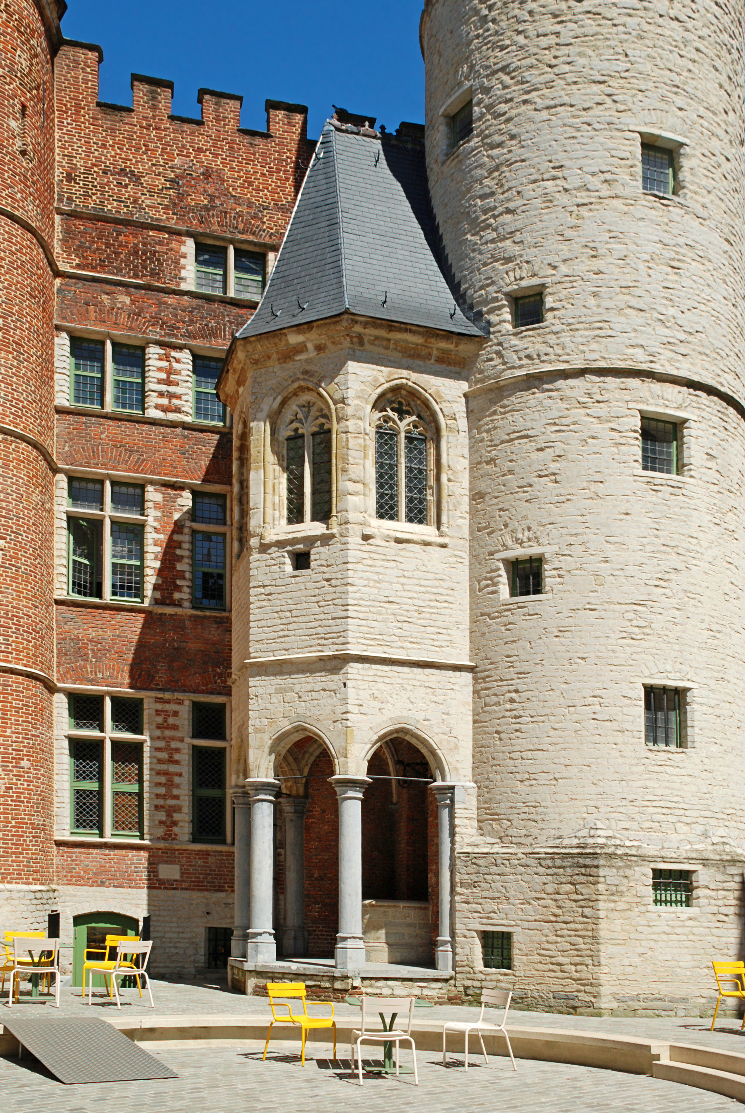 Belgique - Gand - Maison de l'Arrière-Faucille (14e-15e-16e siècles)